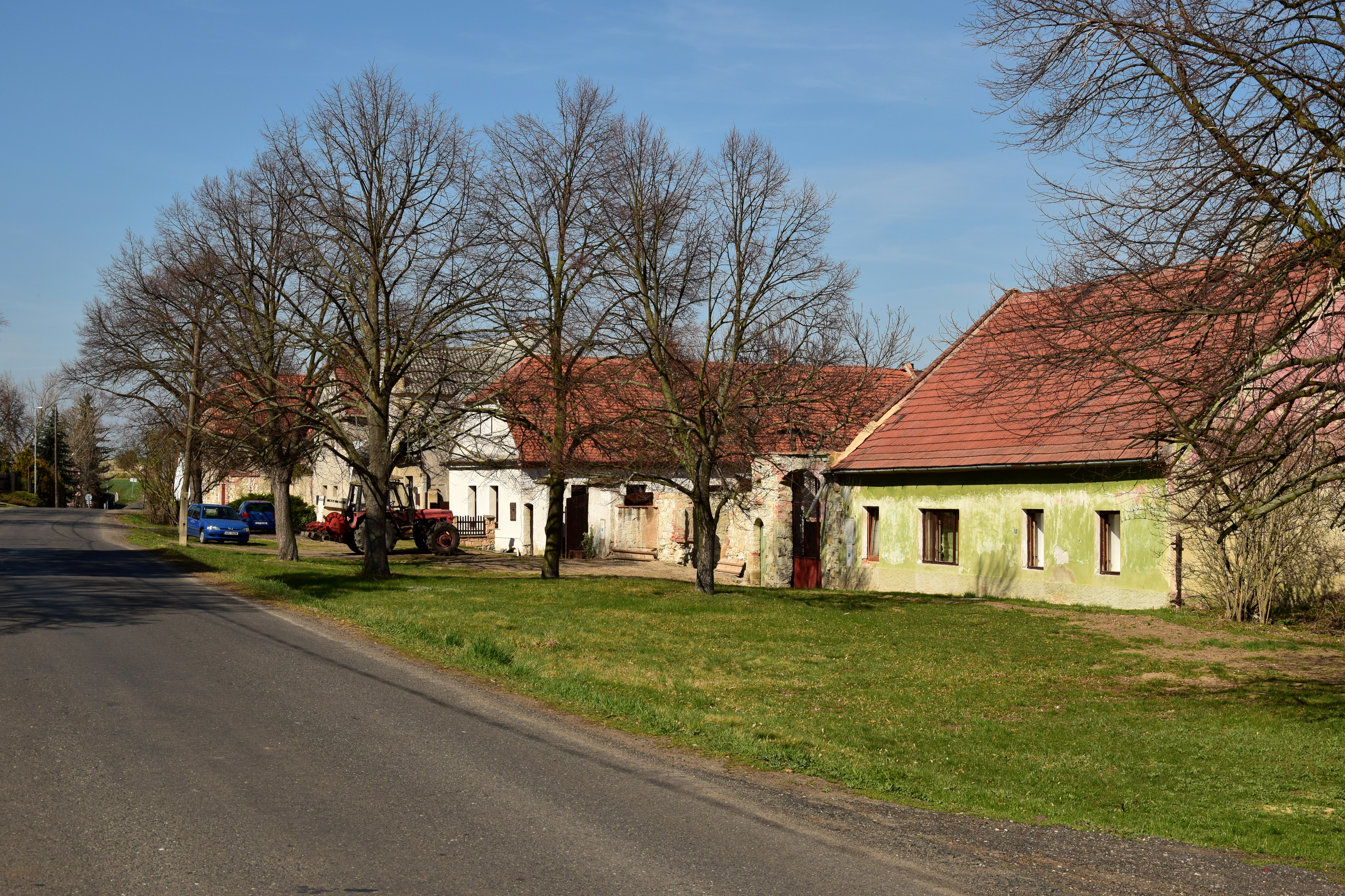 Mory – východní strana návsi